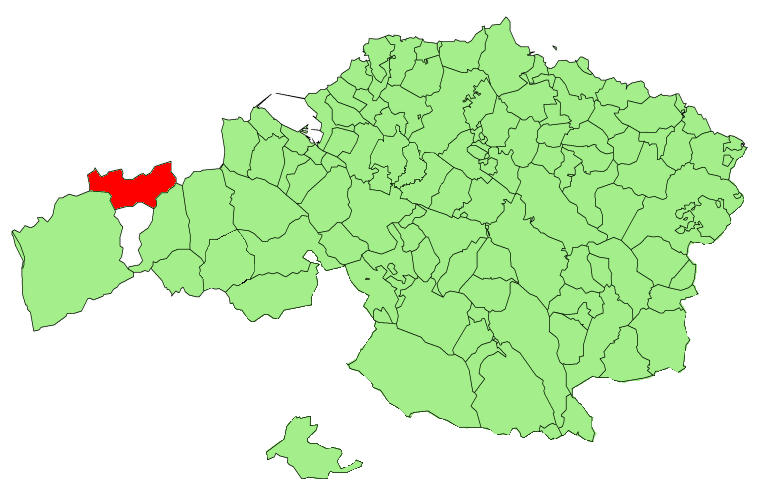 Turtzioz mapan kokatua.